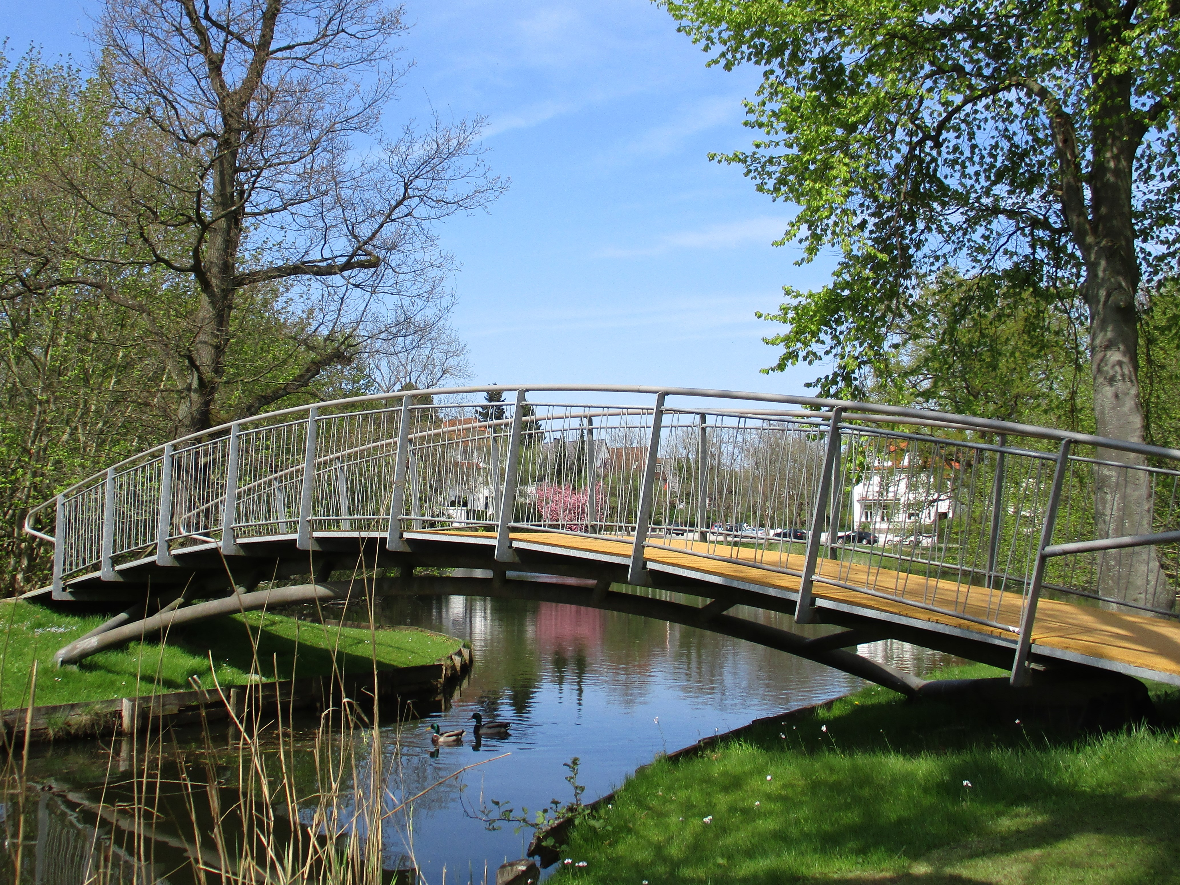 Godewindpark Brücke